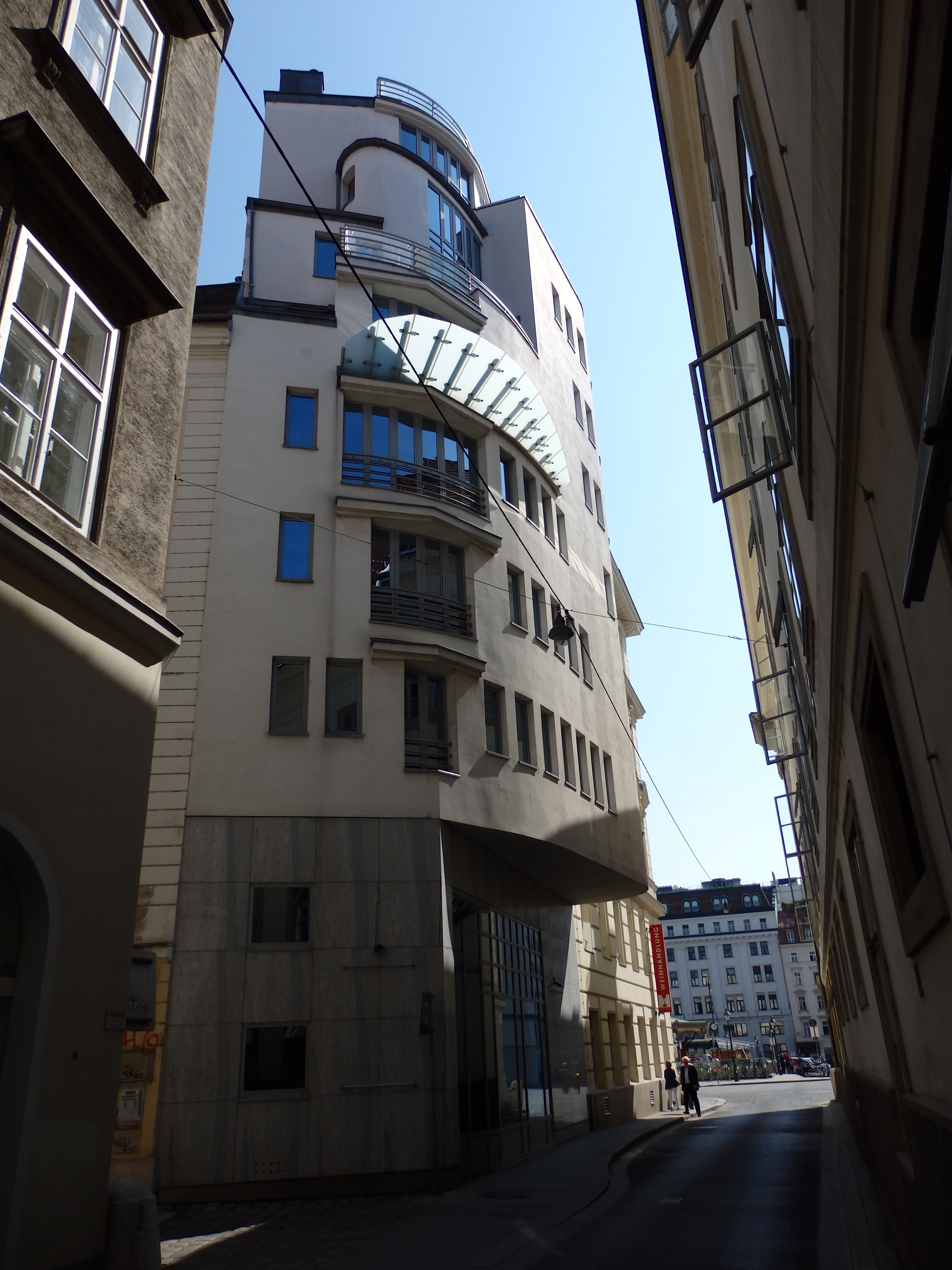 Haus Färbergasse Nr. 4 (1993) von Gerhard Steffel, Wien-Innere Stadt